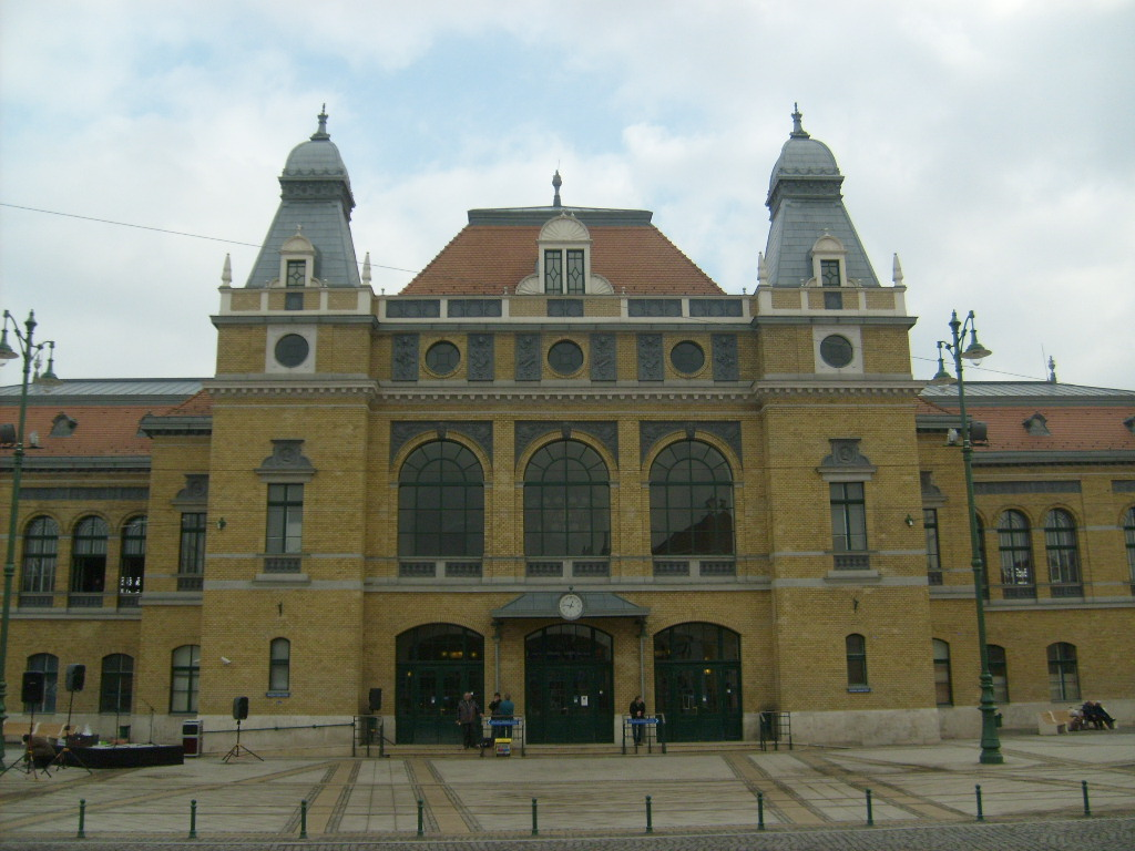 Szeged pályaudvar